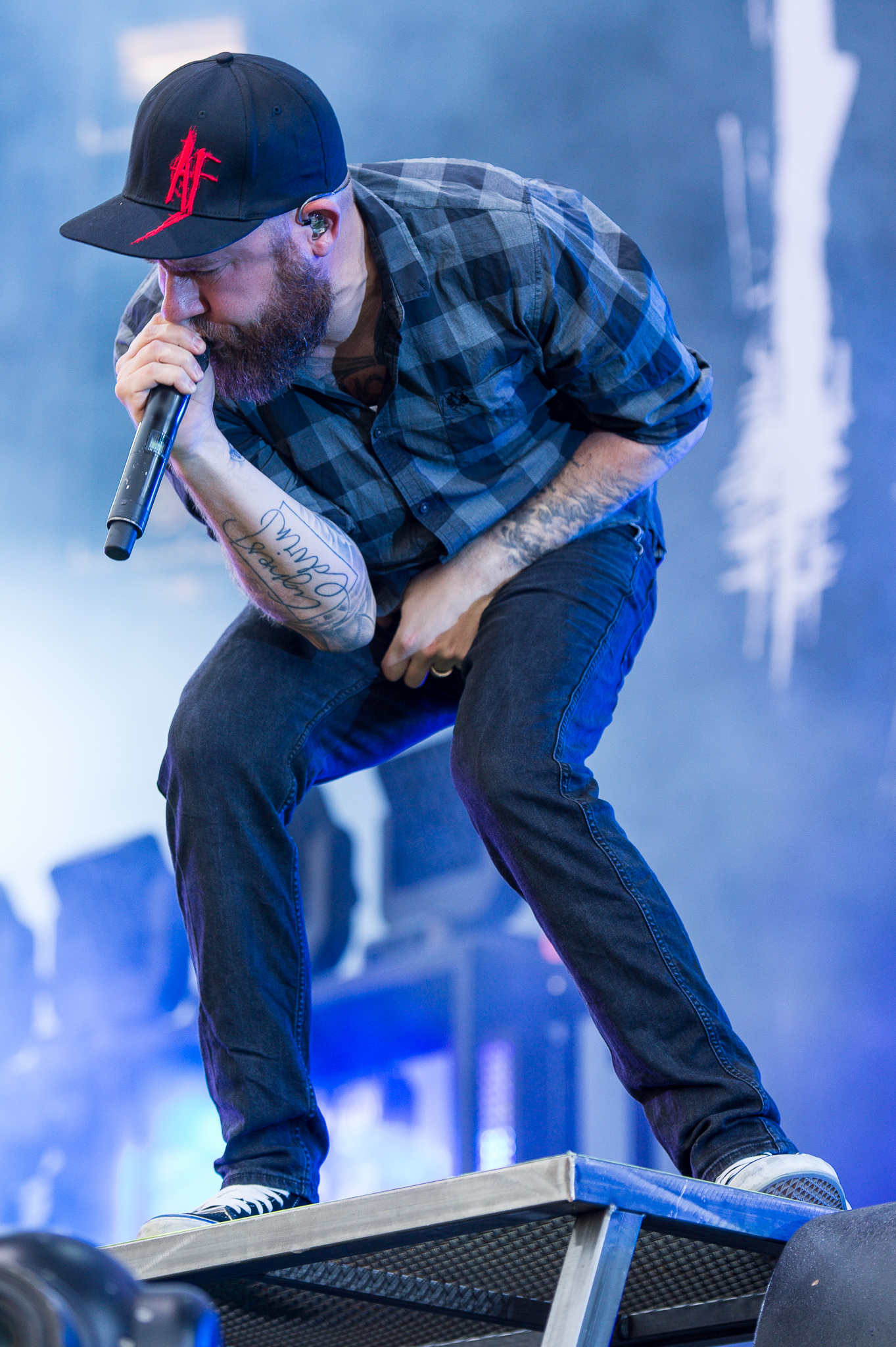 ARGO-Konzerte,Anders Fridén,Beck's Park Stage,Festival,In Flames,Konzert,Livekonzert,Livemusik,Musik,RiP,Rock im Park 2015